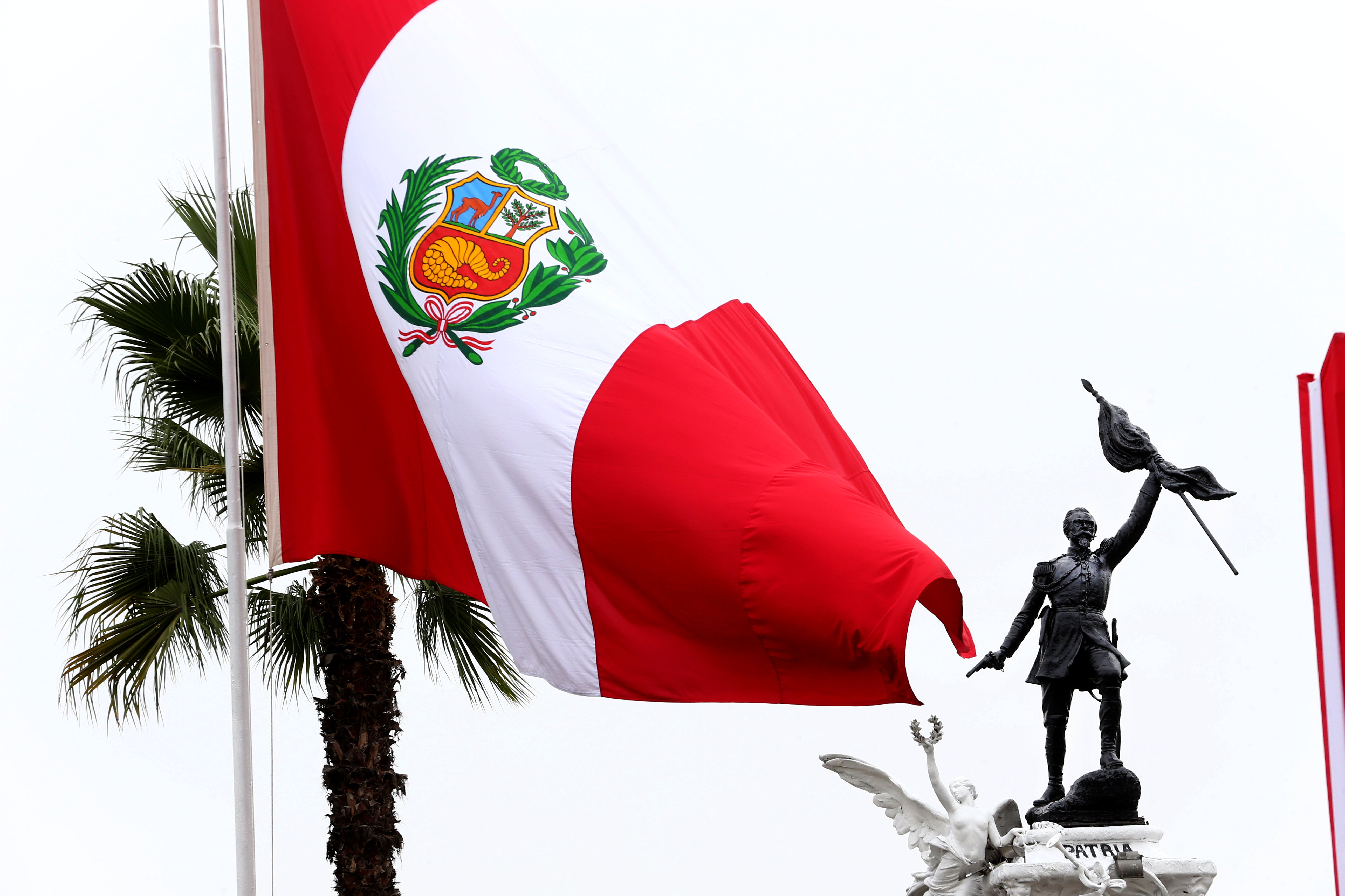 Monumento al coronel Bolognesi en la plaza del mismo nombre.